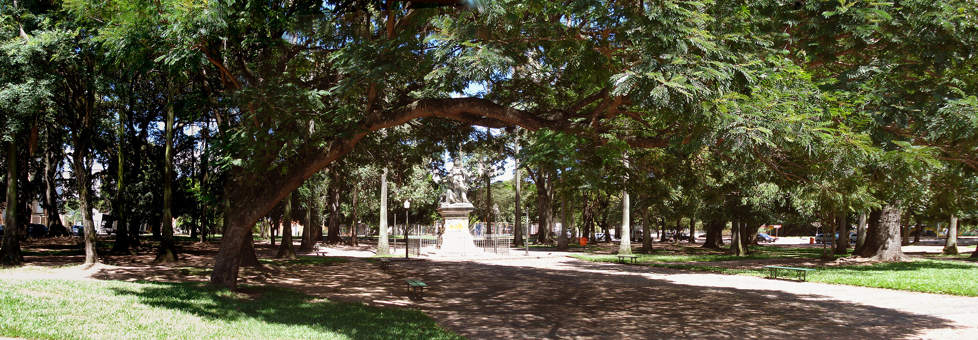 Praça Garibaldi, em Porto Alegre, Brasil.